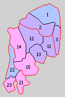 後の佐賀県三養基郡域の町村制時点の町村。